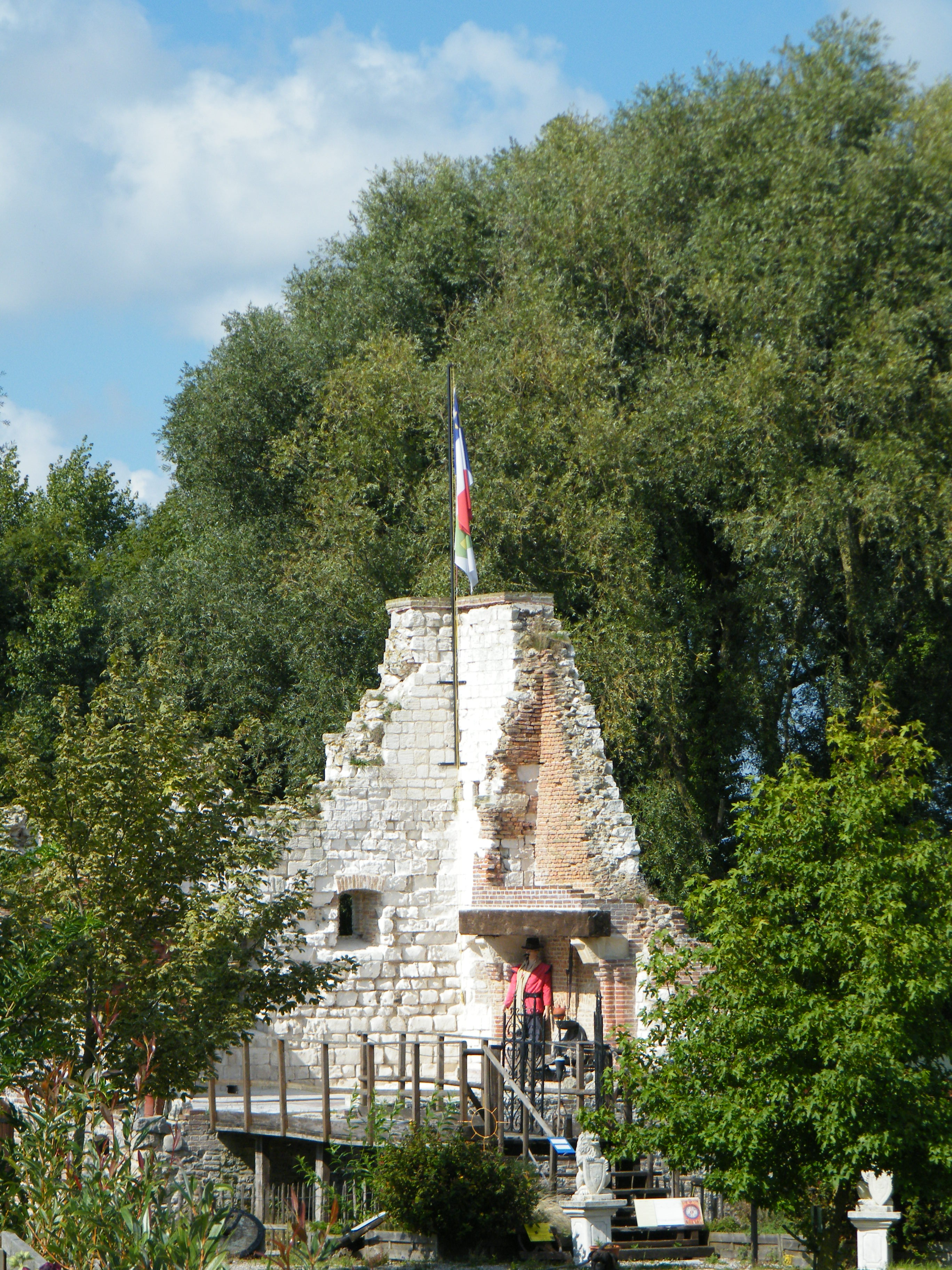 Lanchères, Somme, Fr, ruines du château de Poutrincourt.